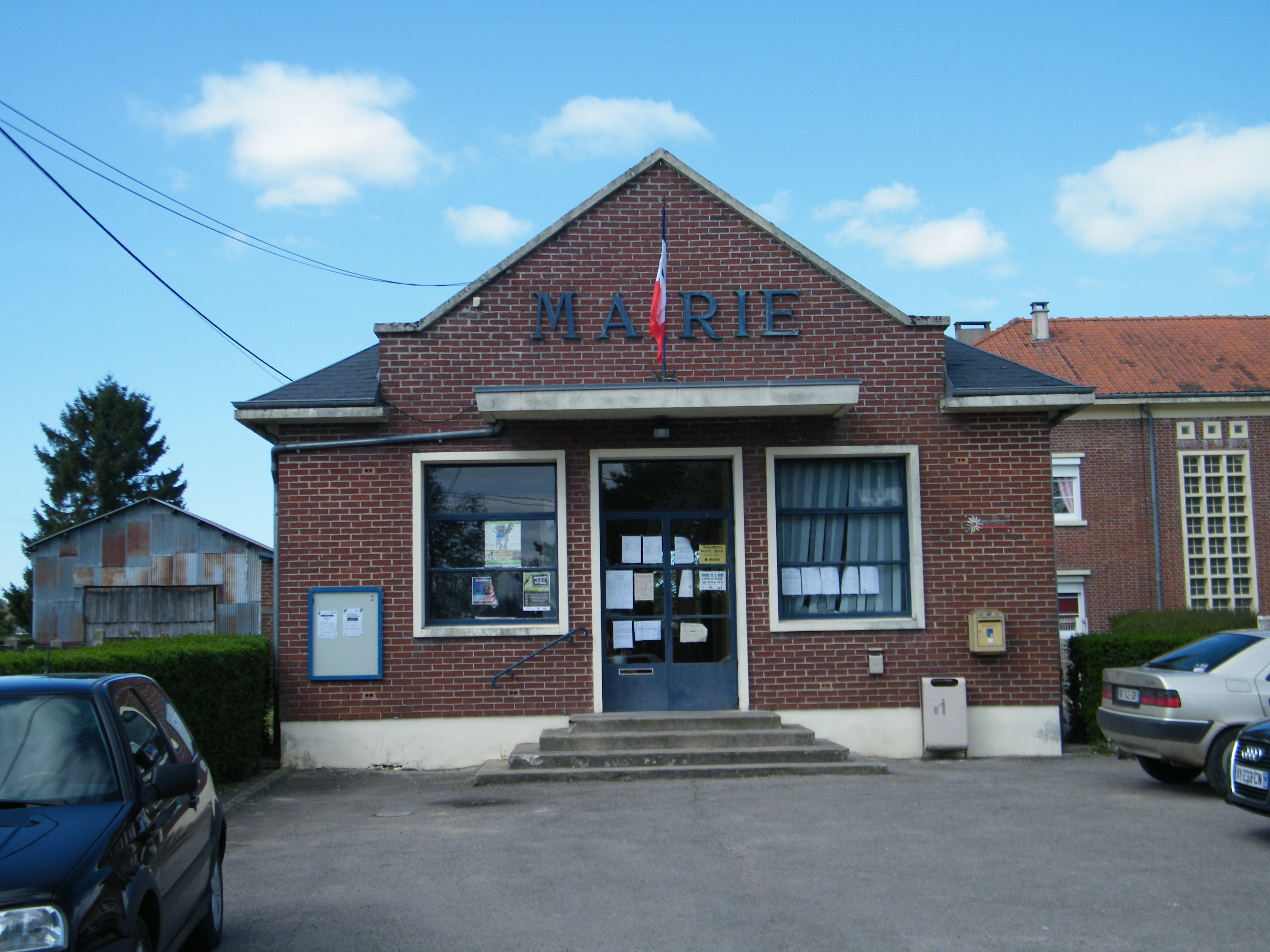 La mairie.